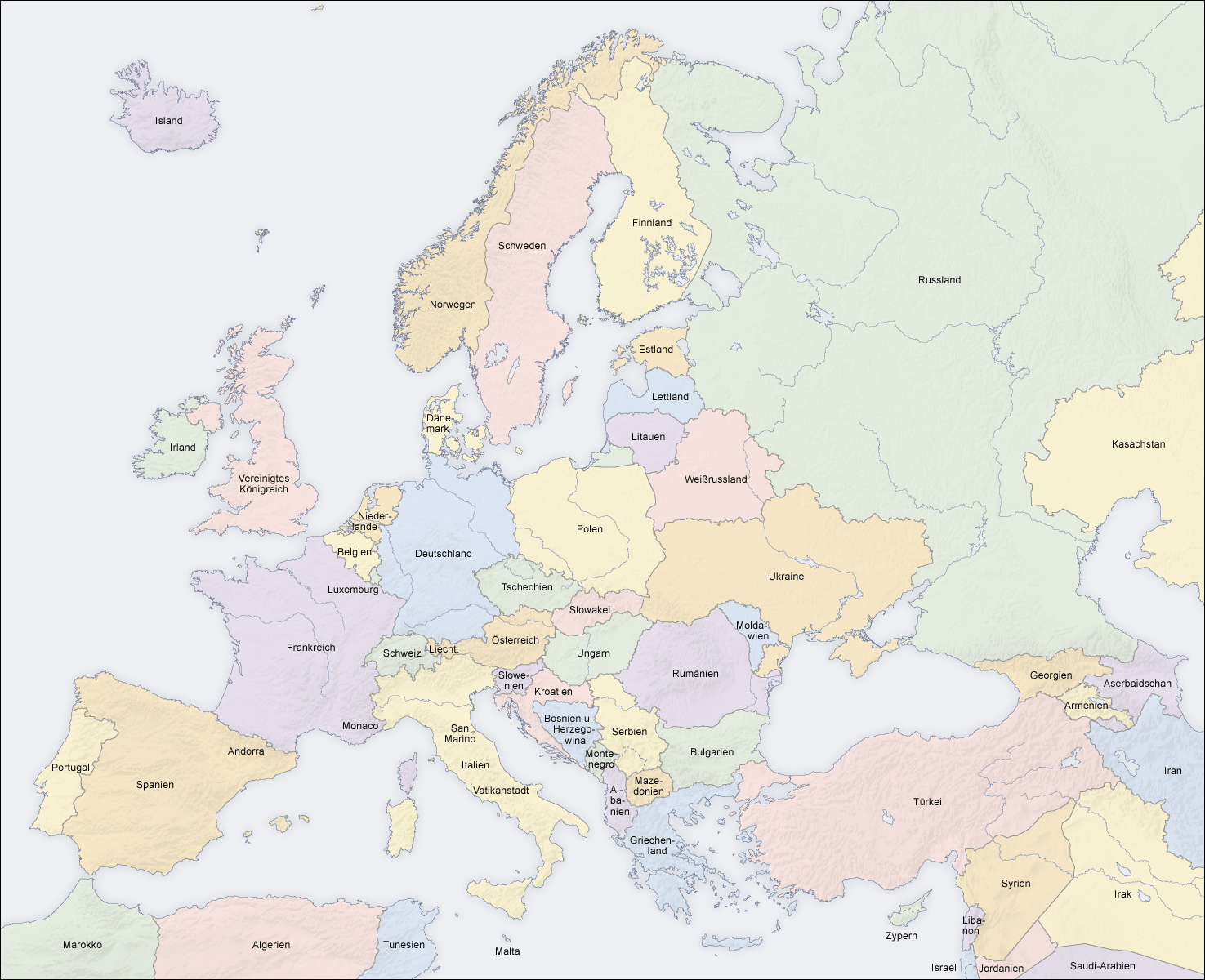 Länder in Europa, Karte de